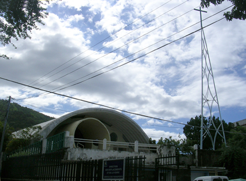 Eglise de La Source